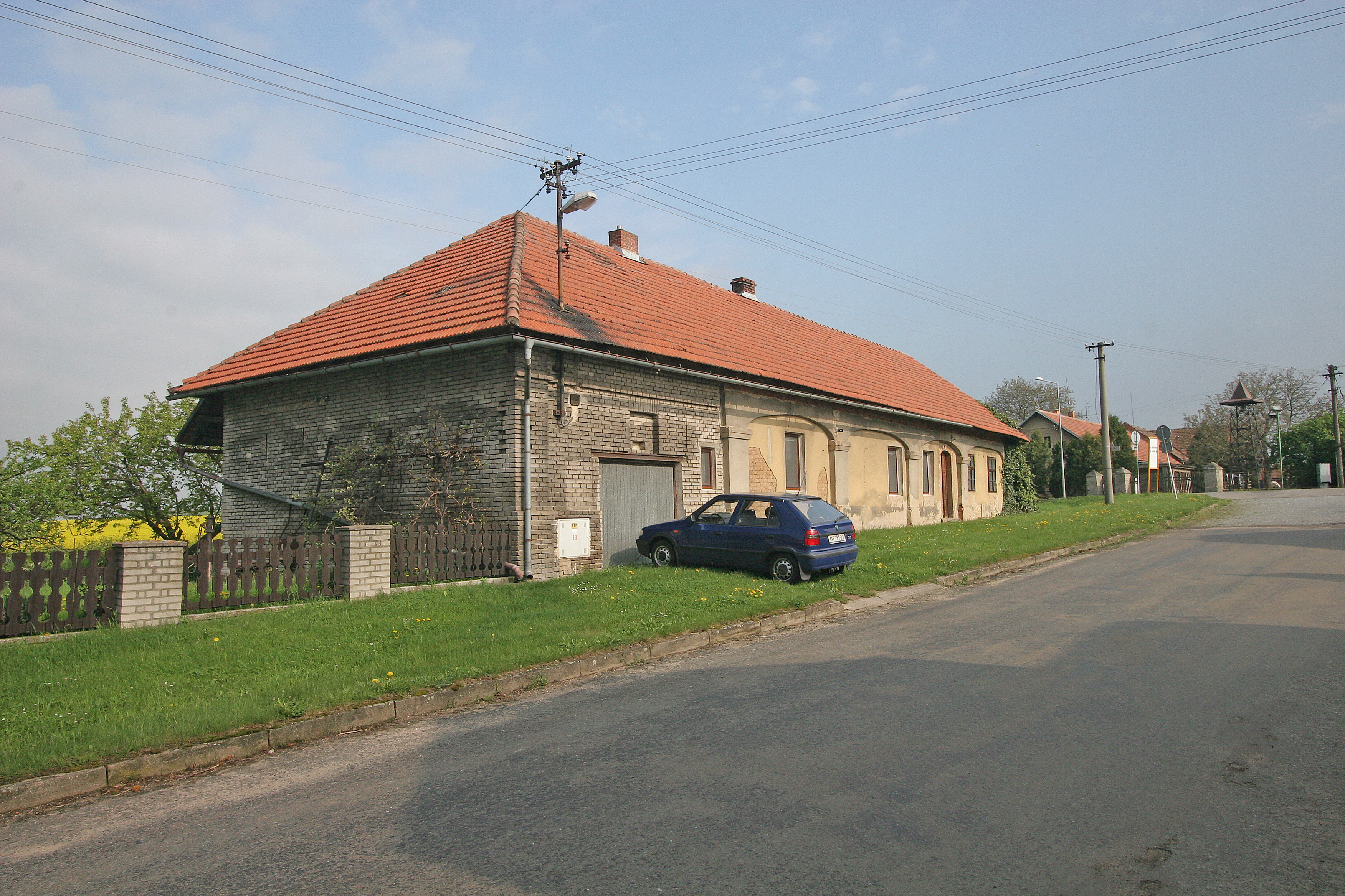 Voleč čp 18 bývalá hospoda